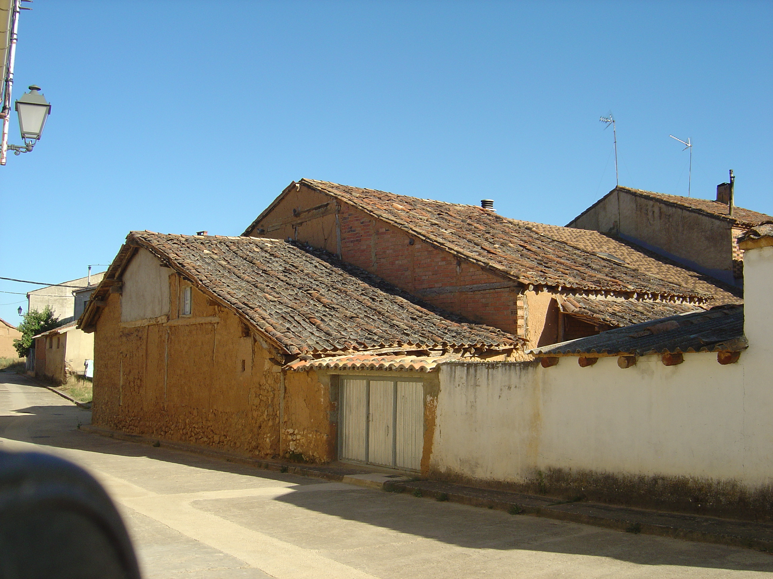 Valderrodilla.Soria.España